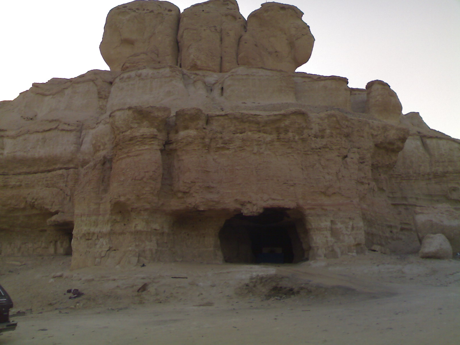 مغارة العيد-بلدة الكوارج.